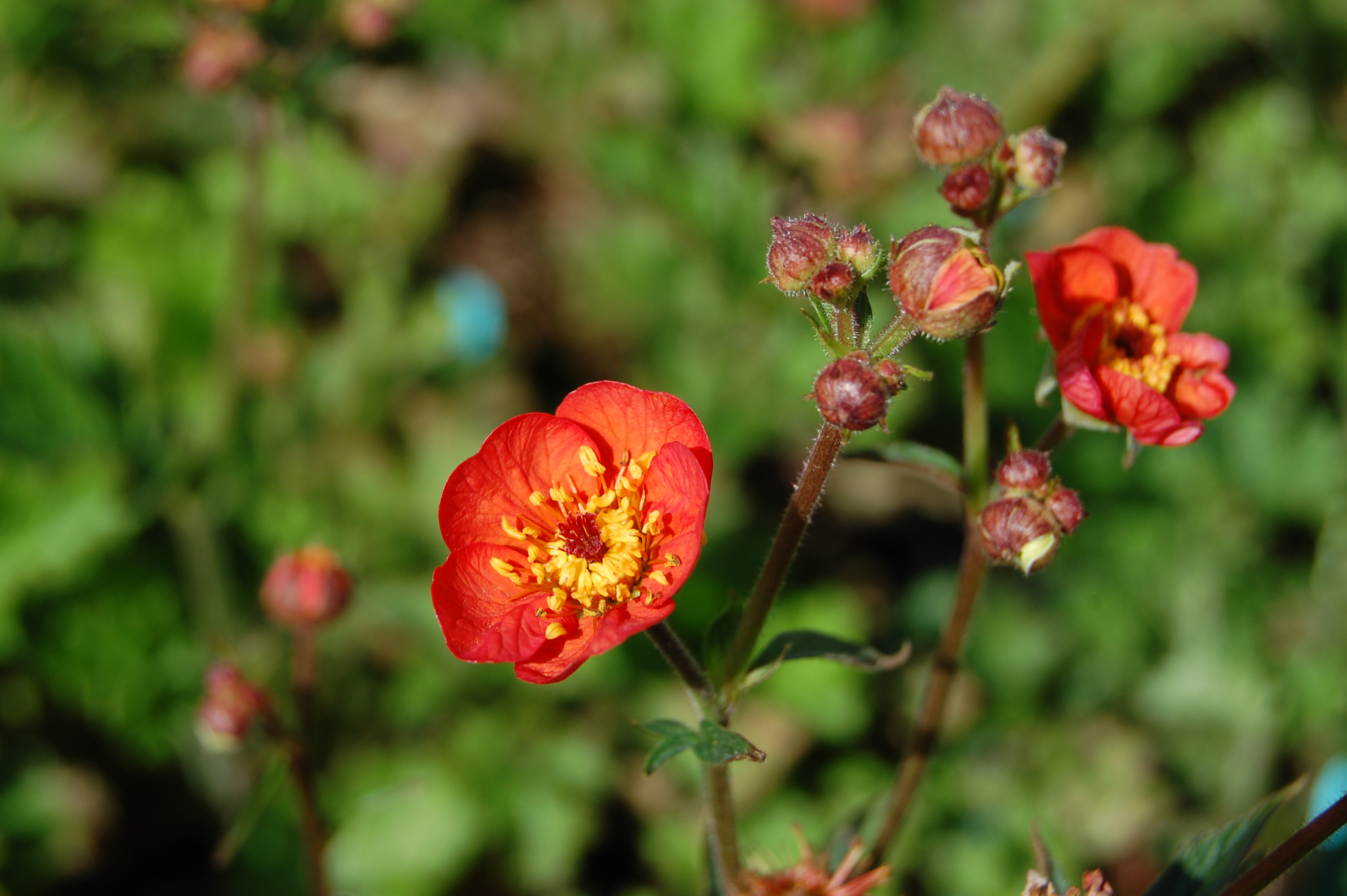 Geum magellanicum